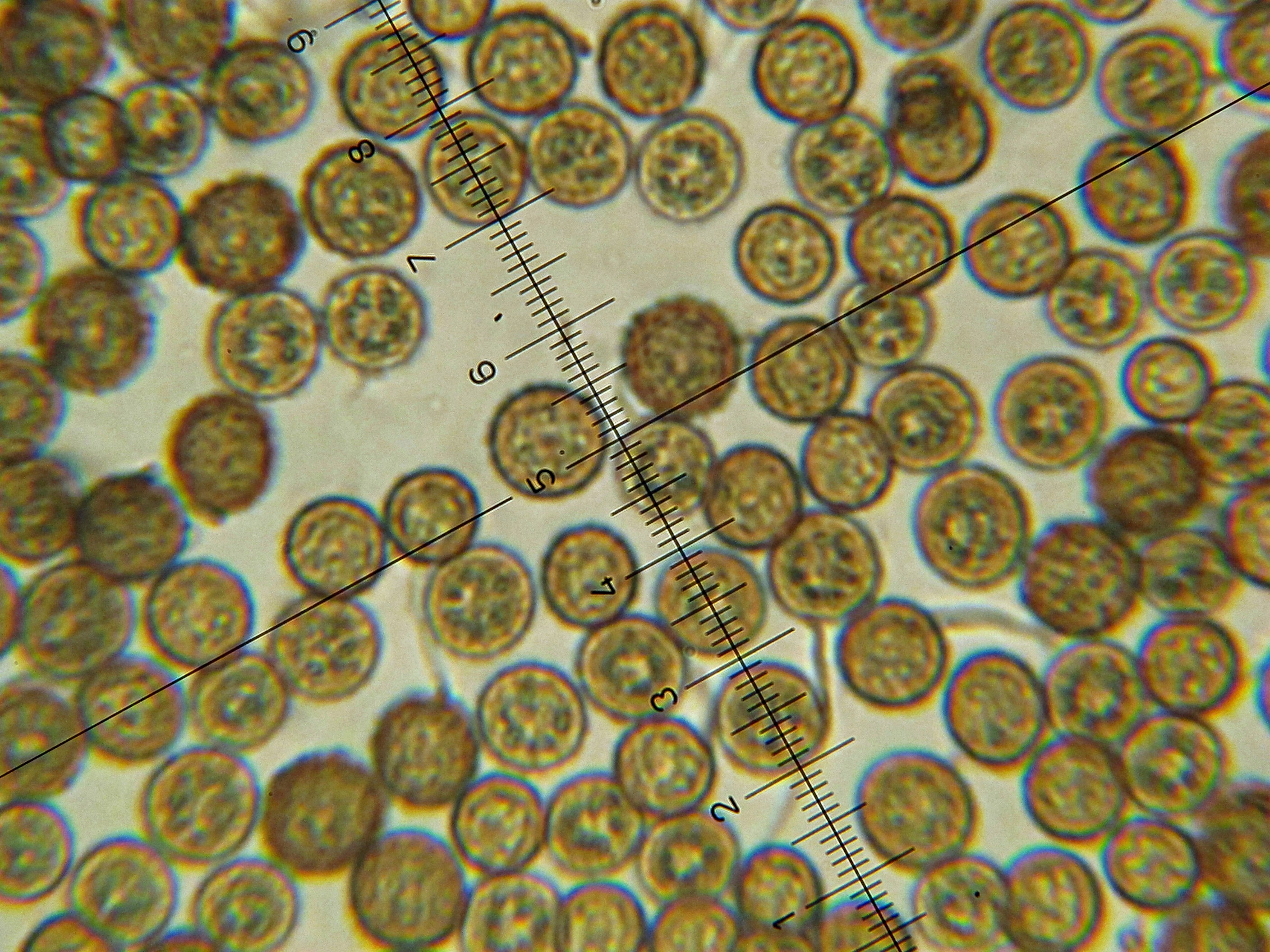 Ustilago maydis (DC.) Corda